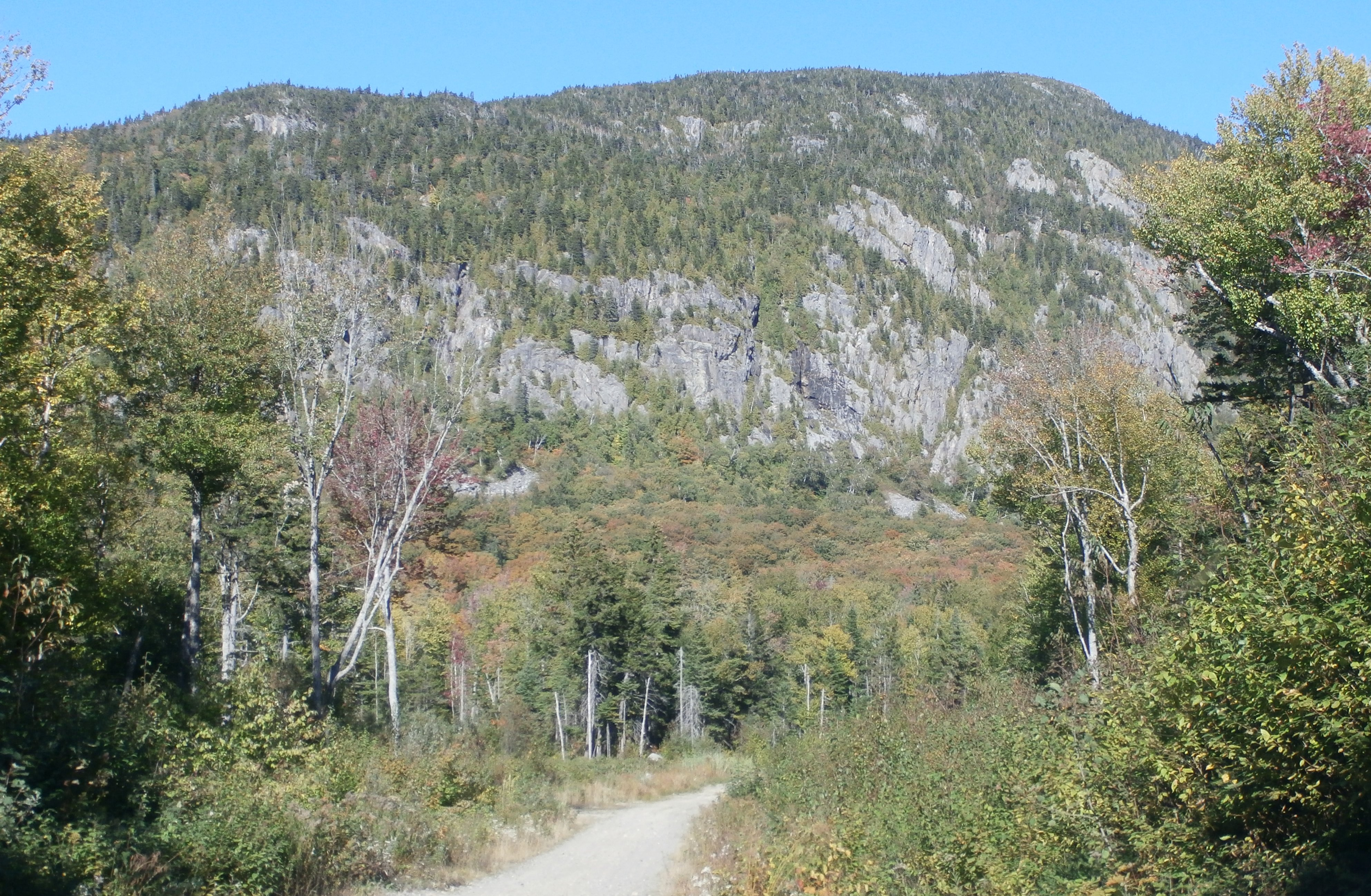 Falaise sud de la montagne de Marbre vue du rang 10 à Notre-Dame-des-Bois.